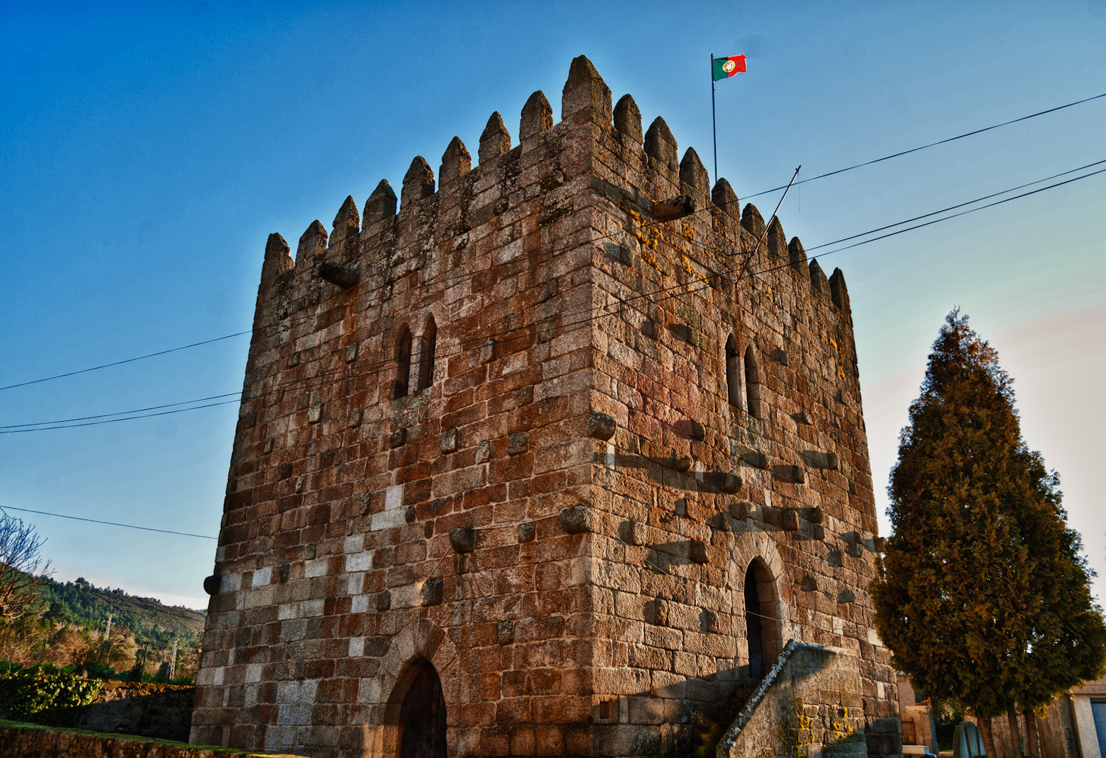 Castillo_de_Santo_Estevao_Chaves